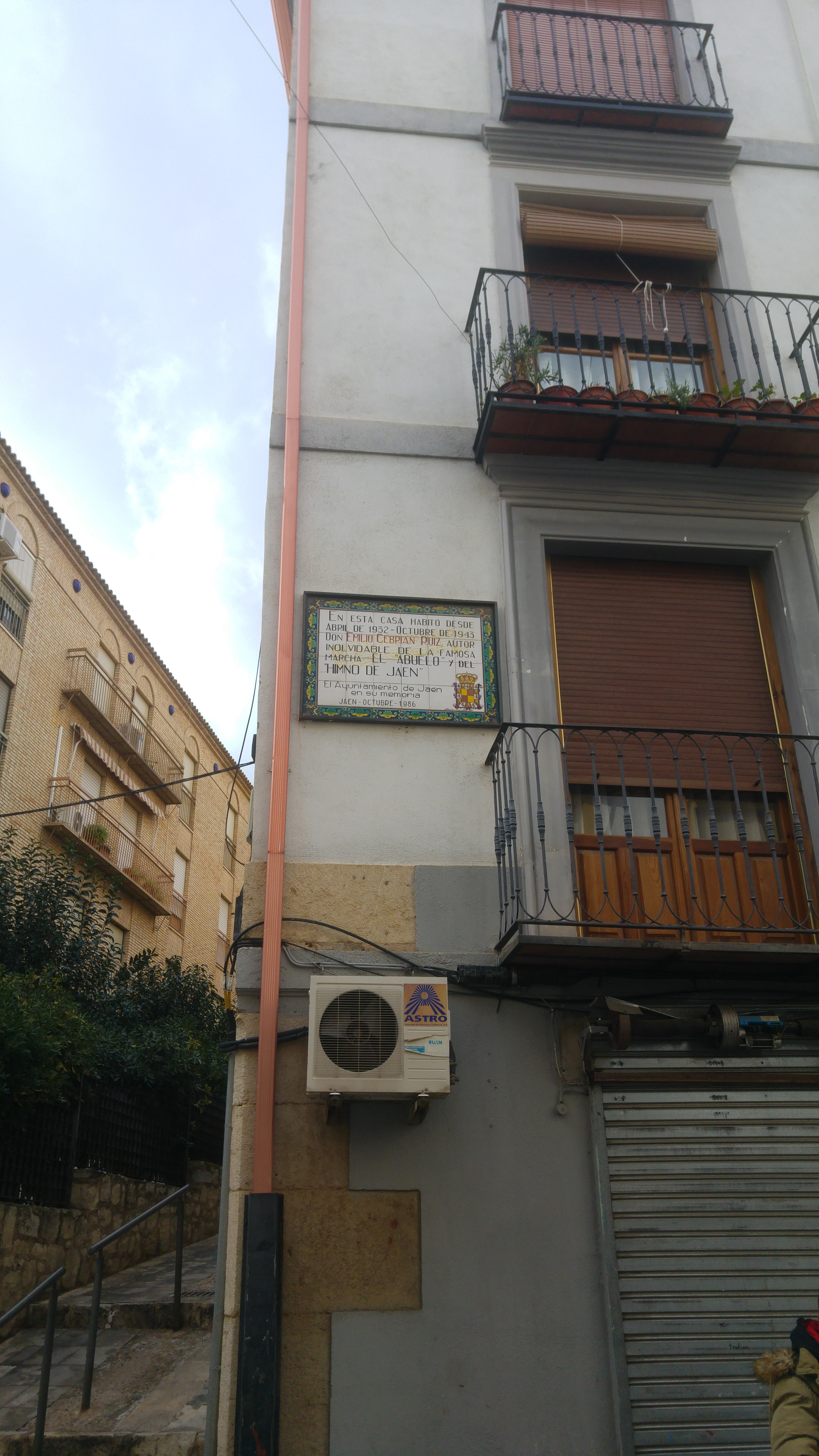 Azulejos recordatorios de la estancia de Emilio Cebrián en la vivienda anexa durante más de diez años. Jaén capital.